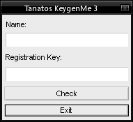 A keygenme